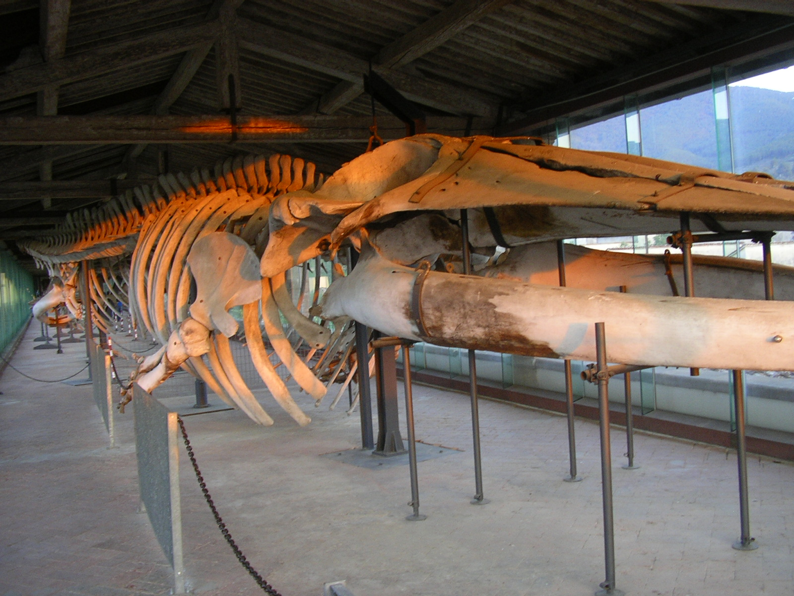 A whale skeleton in the Certosa di Pisa museum, Calci, Pisa, Italy